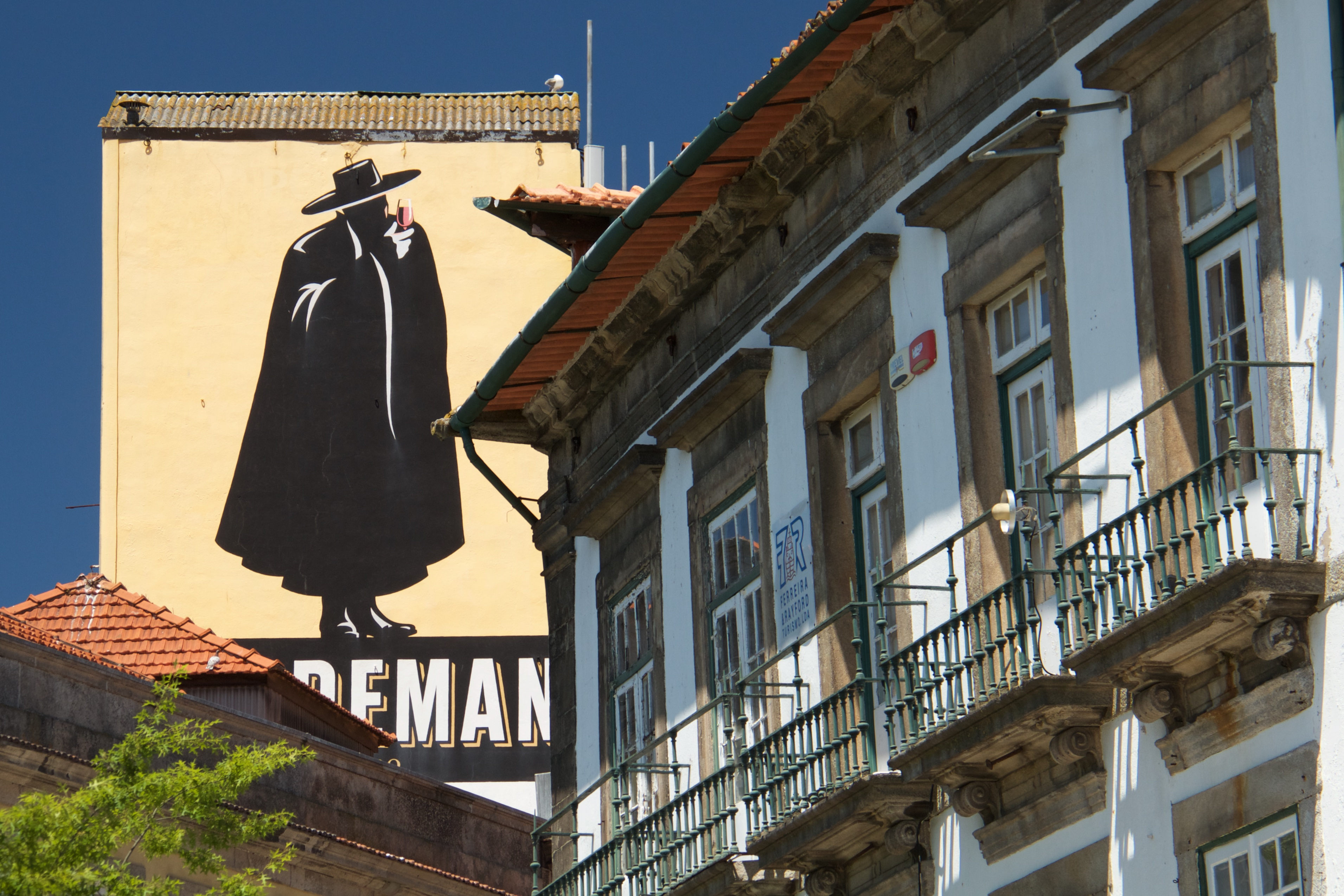 Sandeman, Porto. Edifício sede da empresa Ferreira & Rayford Turismo. Rua de São Francisco